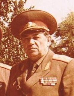 Щербаков Леонид в Майкопе 1989 г.